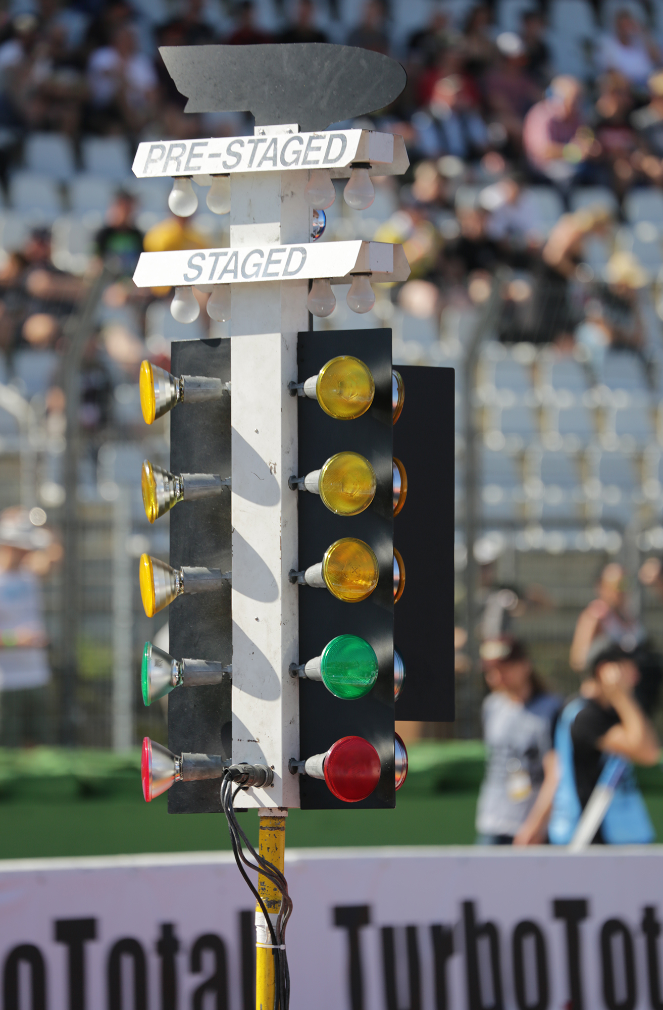 Die Startampel ("Weihnachtsbaum / Christmastree / X-mastree / Lampenladen") für Drag Racing: "Pre-Stage" und "Stage" dienen der exakten Ausrichtung der Rennfahrzeuge in den Lichtschranken an der Startlinie. Die drei gelben Lichter leuchten entweder gleichzeitig (bei den PRO-Klassen) oder nacheinander (bei den SPORTSMAN-Klassen) auf. Grün signalisiert die Startfreigabe. Rot zeigt das Verlassen der Lichtschranke vor Startfreigabe an. Hockenheimring, 2019. PAR38 Leuchtmittel.